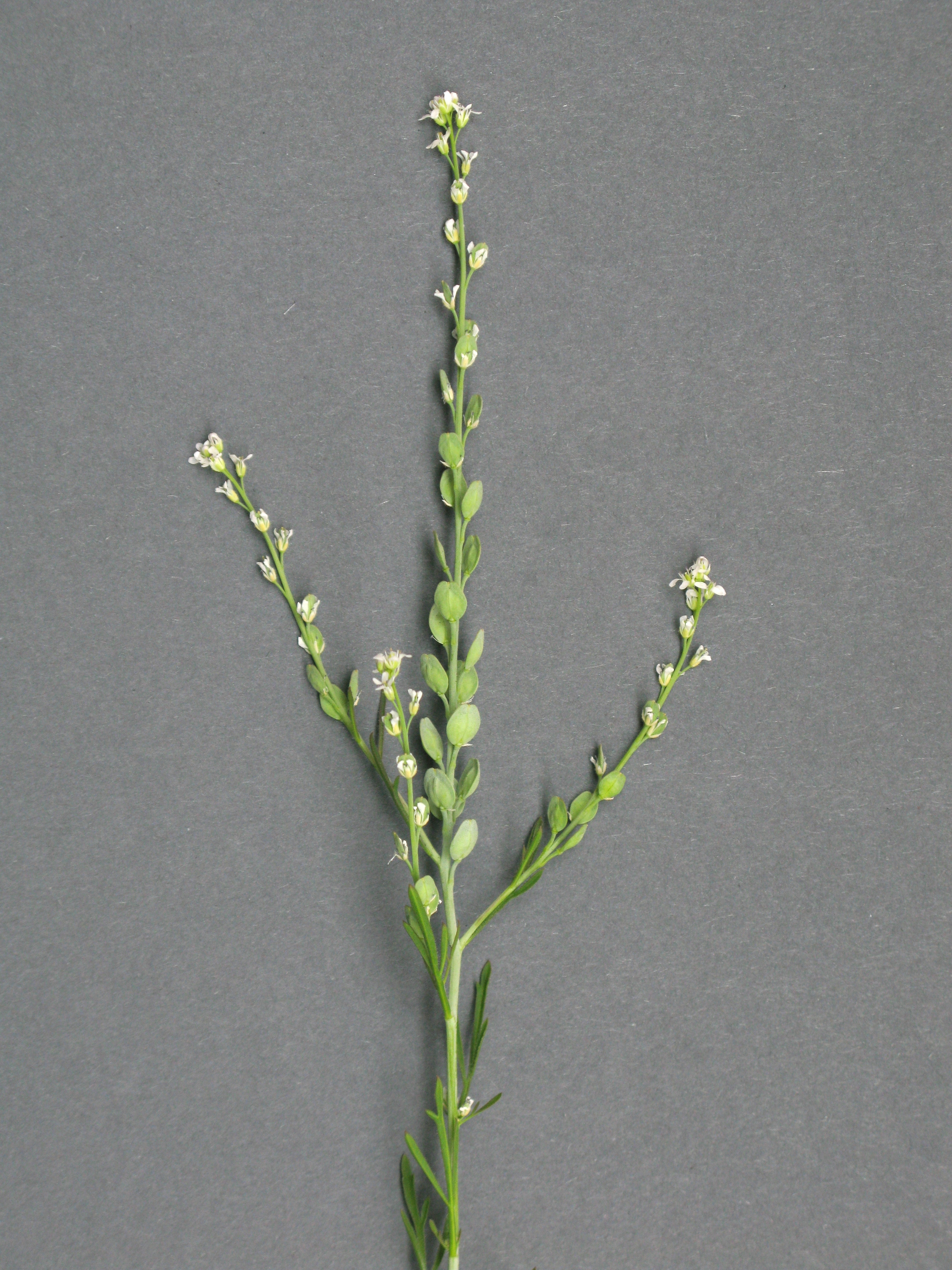 Gartenkresse, ausgewachsen